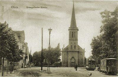 Gdańsk Orunia, ul. Gościnna 15 - dawny kościół ewangelicki św. Jerzego, obecnie rzymskokatolicki parafialny p.w. św. Jana Bosko, 1820-1823